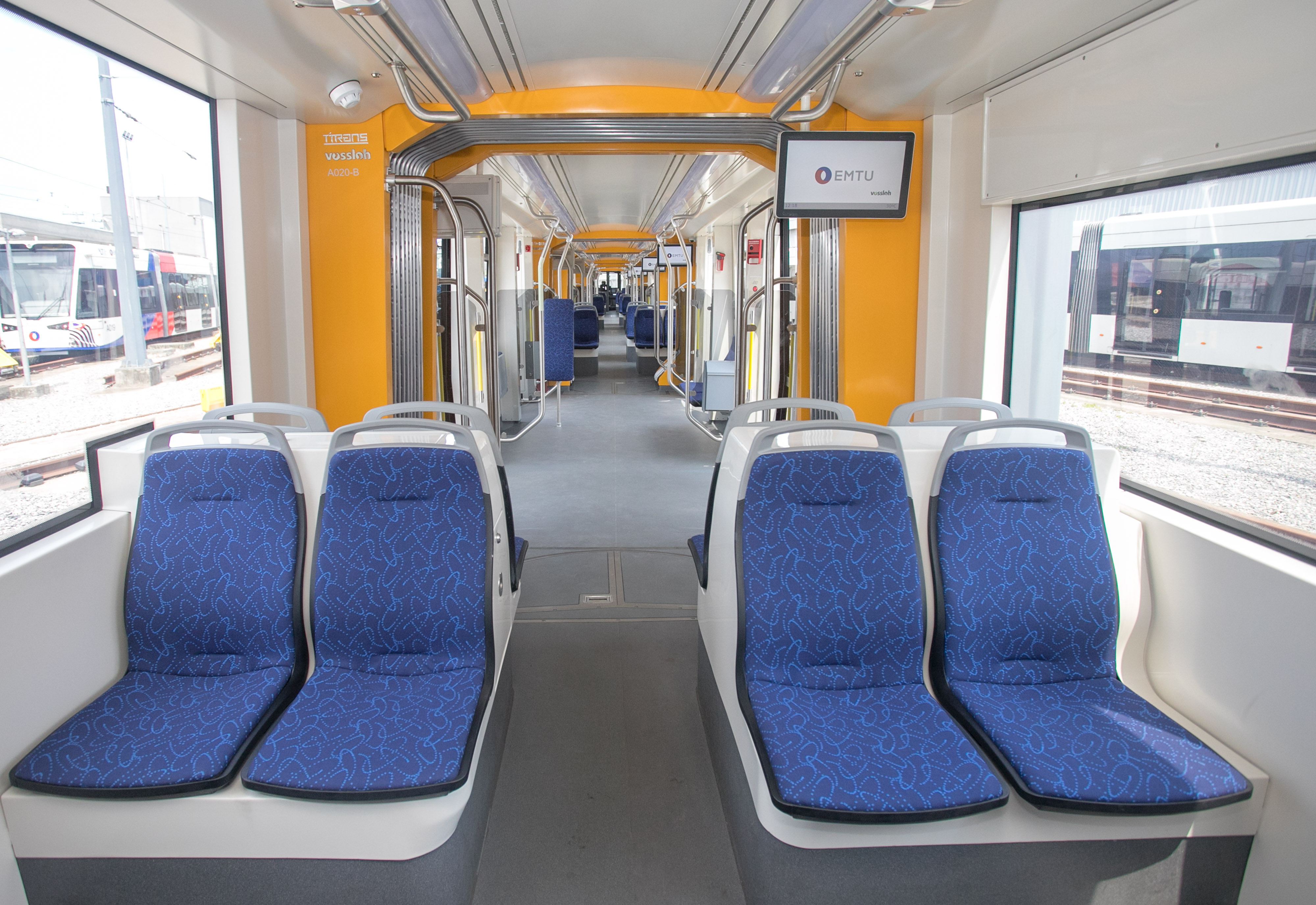 galeria16